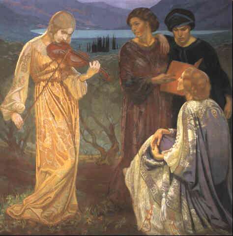 Harmonie, 1914. Tempera, 70,9 x 70,5 in. / 180 x 179 cm